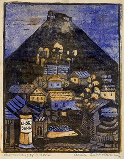 Krzemieniec - Góra Bony